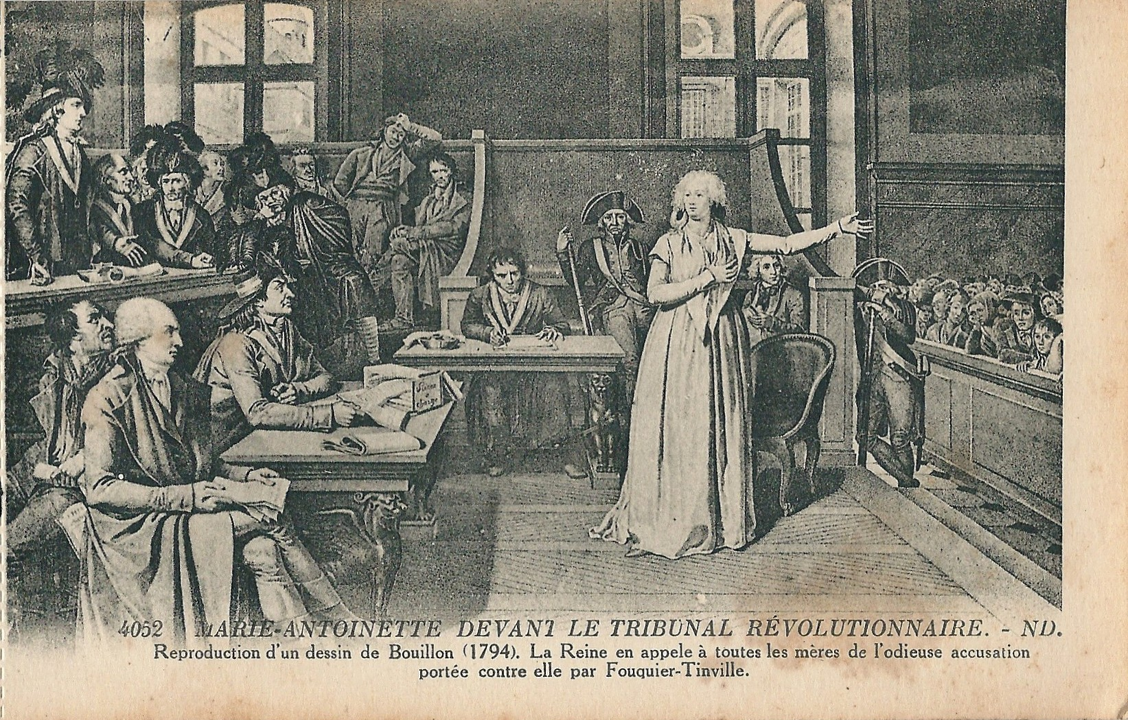 Marie-Thérèse d’Autriche devant le tribunal qui la juge pour ses crimes